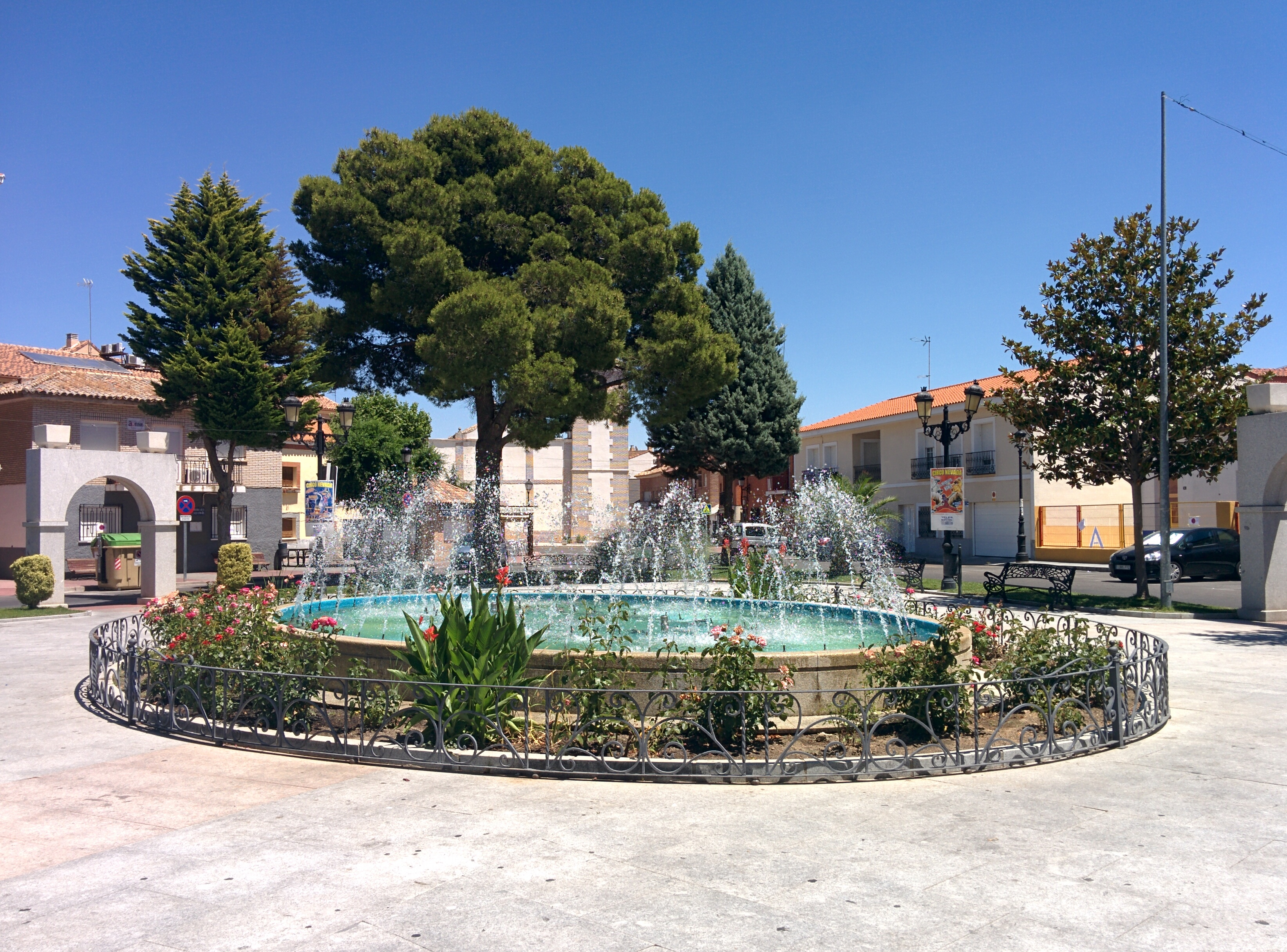 Plaza de España, en Yeles (Toledo, España).